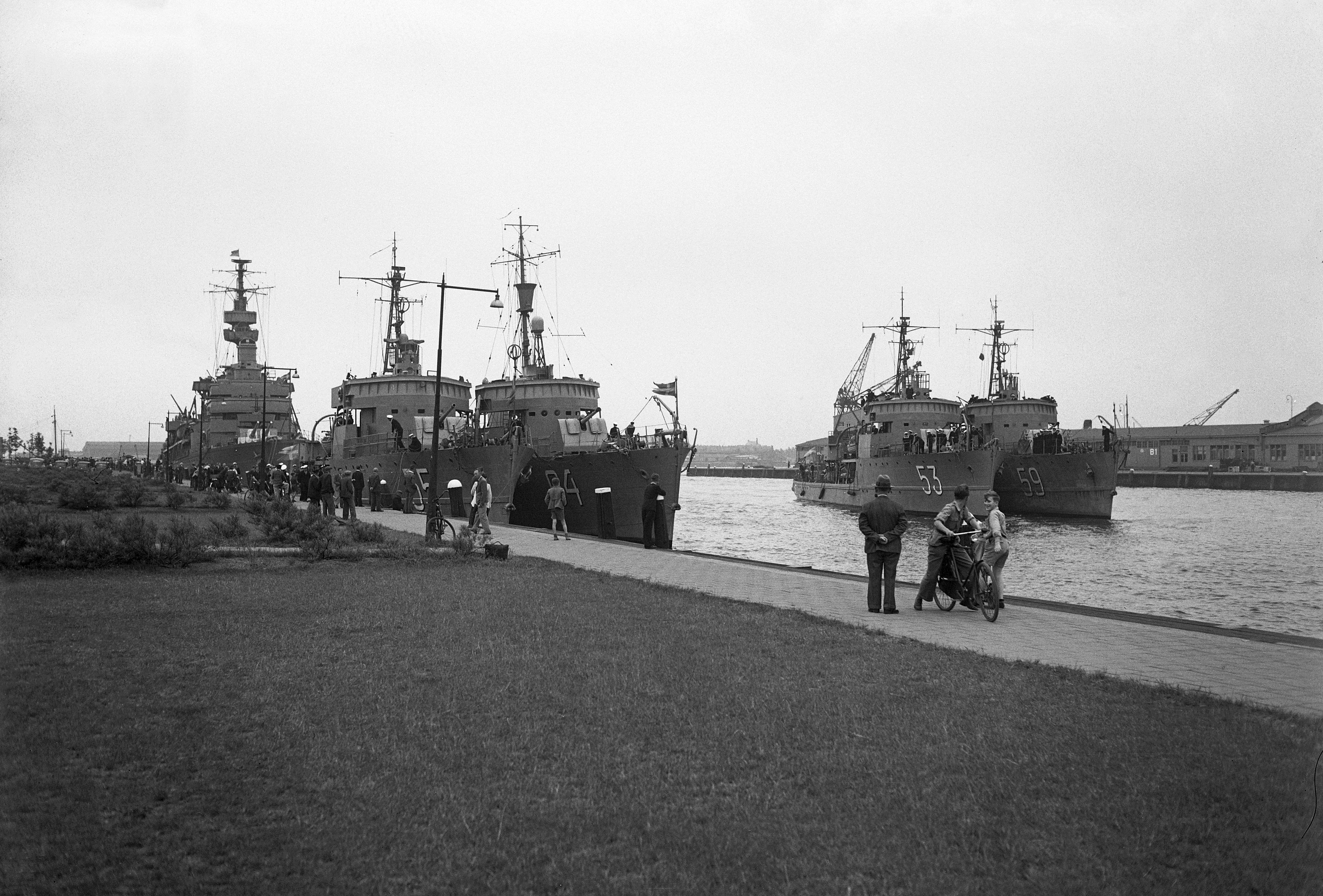 Collectie / Archief : Fotocollectie Anefo Reportage / Serie : [ onbekend ] Beschrijving : Zweedse kruiser Gotland met 4 mijnenvegers (HMS Bremön (55), HMS Kullen (64), HMS Arholma (53), HMS Bredskär (59)) Rotterdam Datum : 8 juni 1950 Locatie : Rotterdam, Zuid-Holland Trefwoorden : MIJNENVEGERS, kruisers Fotograaf : Winterbergen, […] / Anefo Auteursrechthebbende : Nationaal Archief Materiaalsoort : Glasnegatief Nummer archiefinventaris : bekijk toegang 2.24.01.09 Bestanddeelnummer : 904-0056